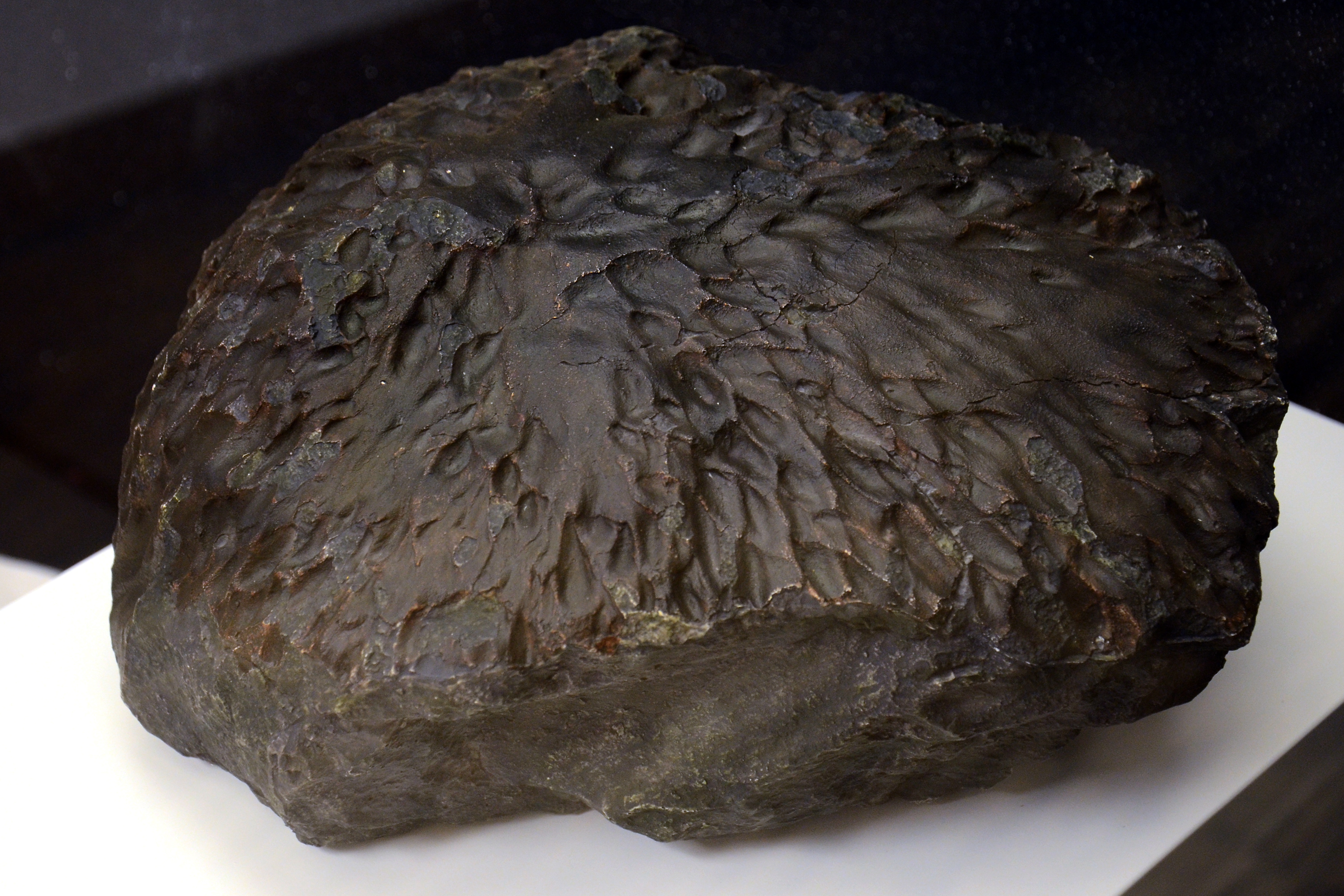 Krähenberg - Meteorit, Pfalzmuseum für Naturkunde Bad Dürkheim